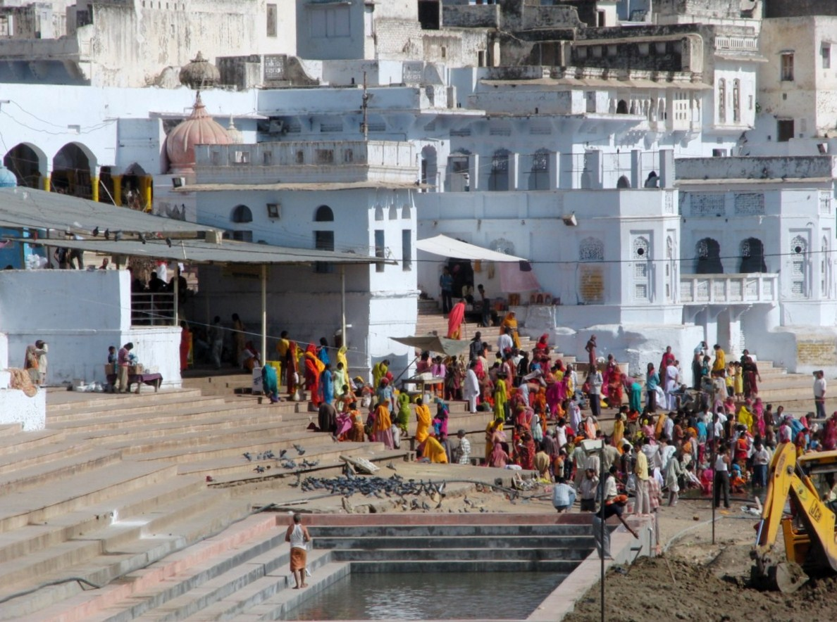 Fidèles sur le Pushkar_Lake Pushkar au Rajasthan en Inde.